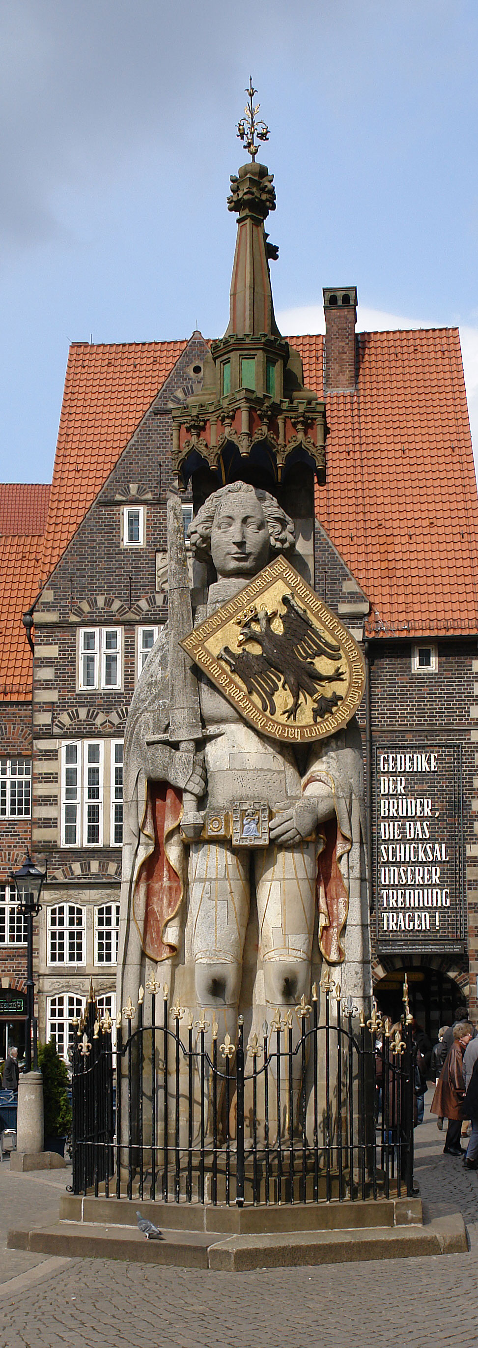 Der Roland auf dem Marktplatz in Bremen. Mit dem Bremer Rathaus Teil des Weltkulturerbes.